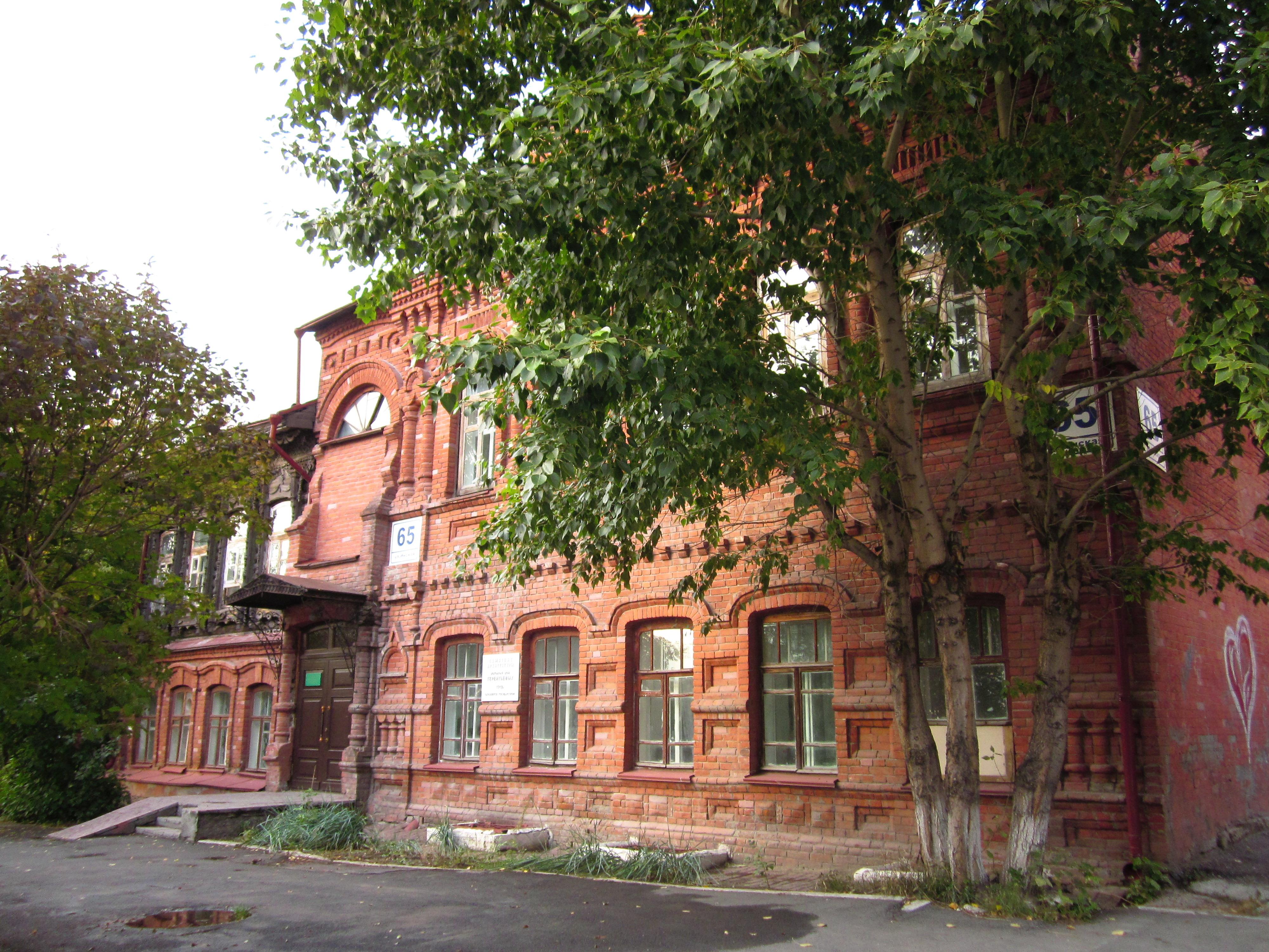 Дом Терентьевых. ул. Инская, 65. Конец XIX - XX века.